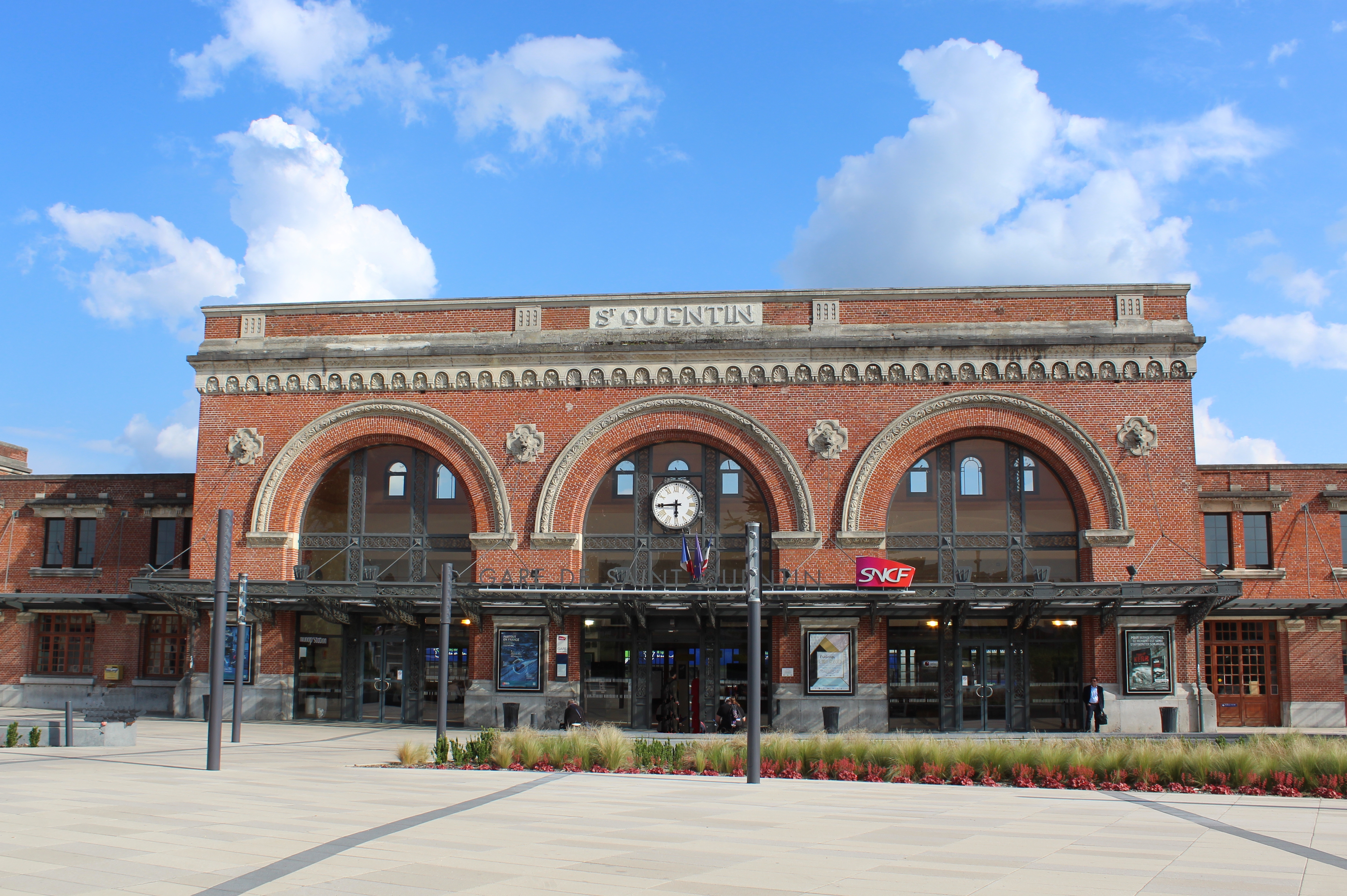 Le gare